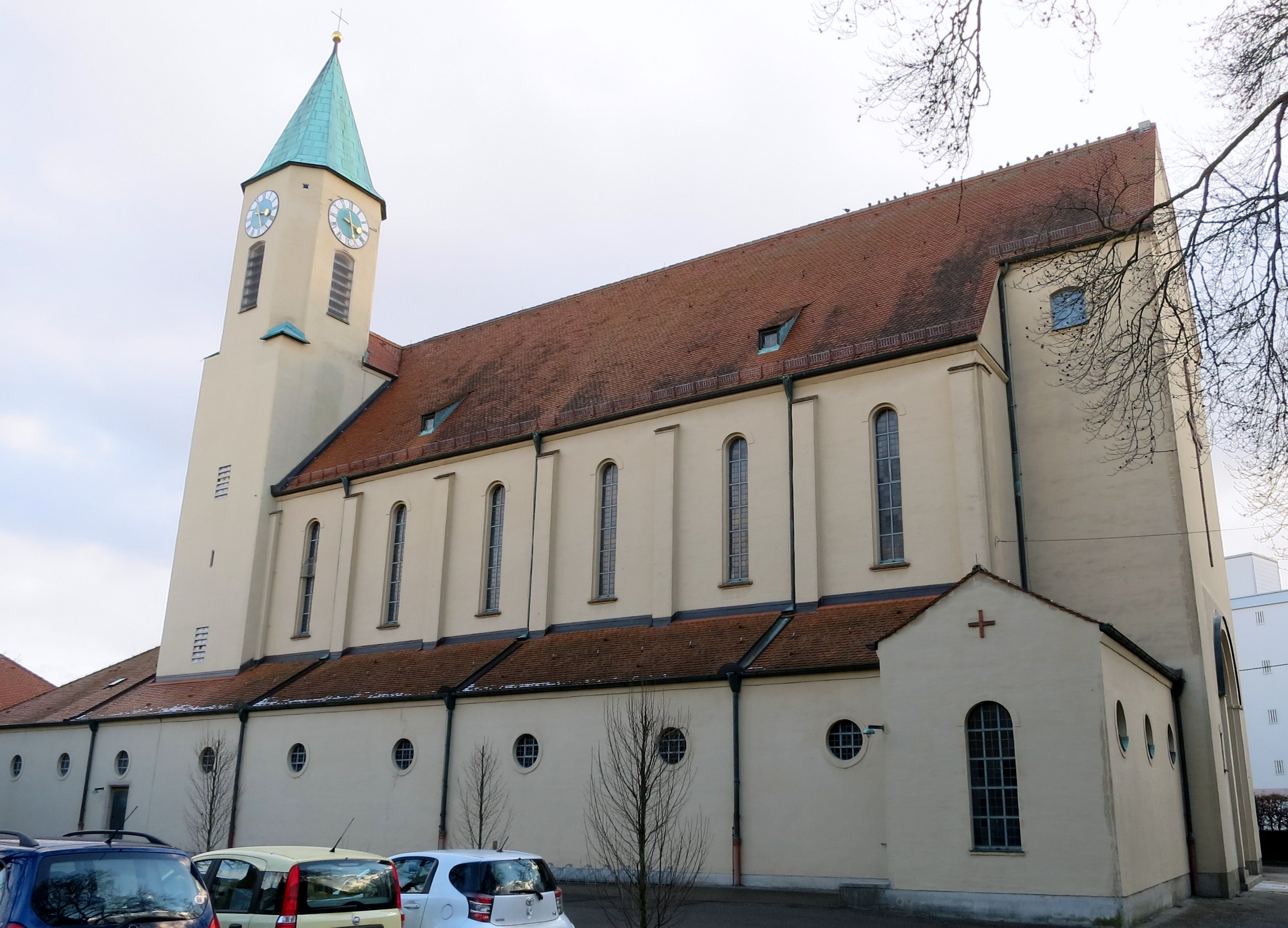 Kirche im Februar 2018